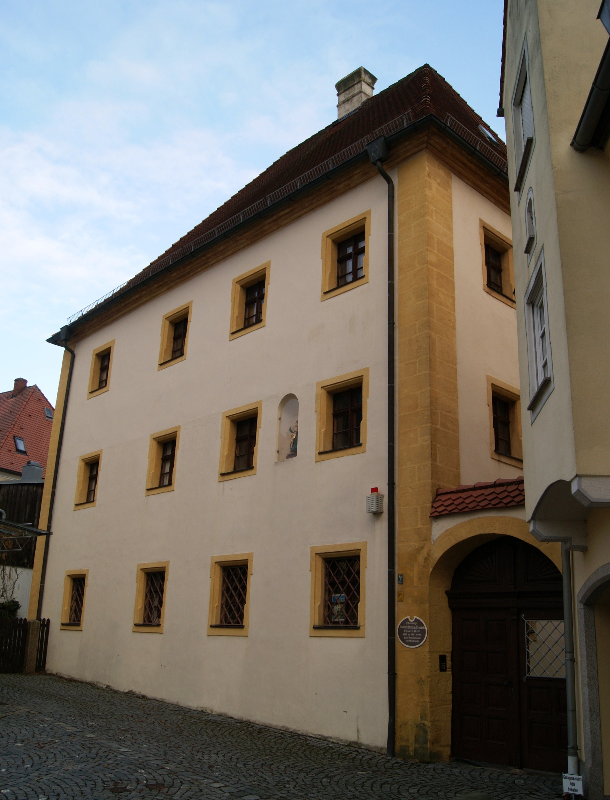 Kemnath, Trautenbergstraße 36; D-3-77-129-46; Landrichterliche Fronveste; Dreigeschossiger Putzbau mit Hausteingewänden, Eckquadern und hohem Walmdach, 17. Jahrhundert, teilweise über Stadtmauer aus der zweiten Hälfte 14. Jahrhundert